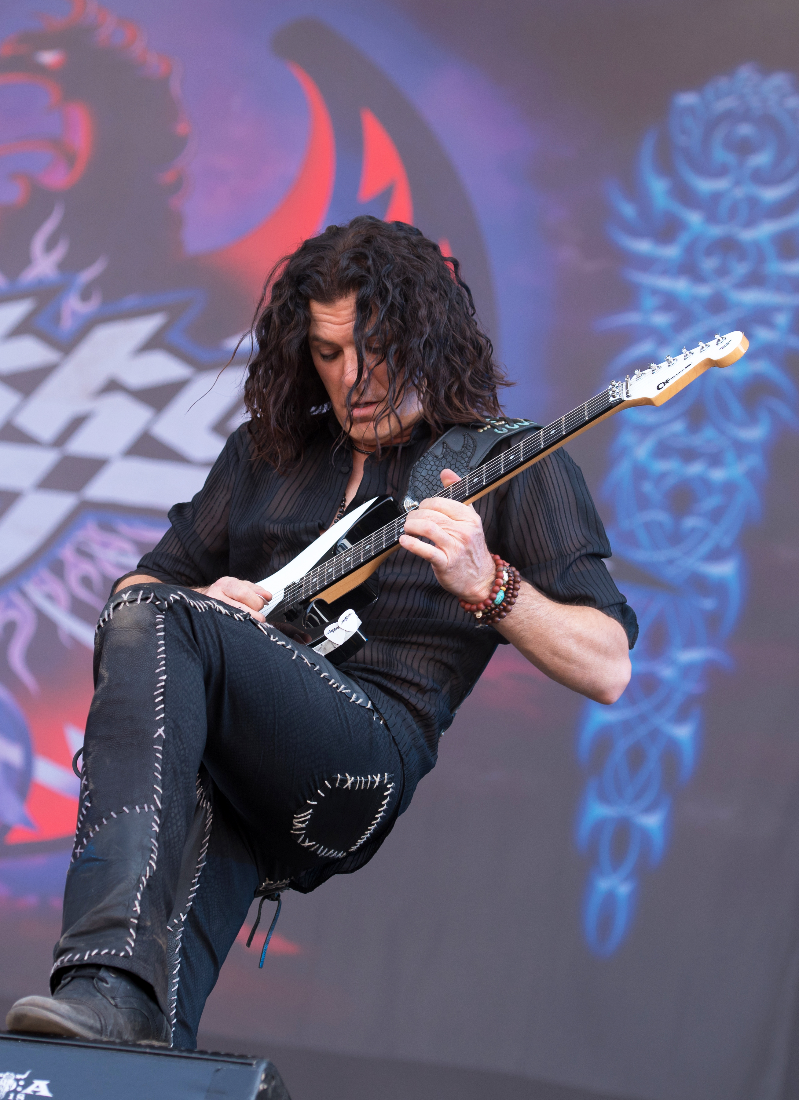 Dokken beim Wacken Open Air 2018